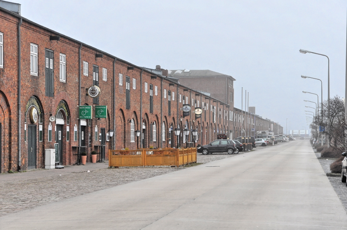 Restaurants Fischereihafen Jan. 2015.